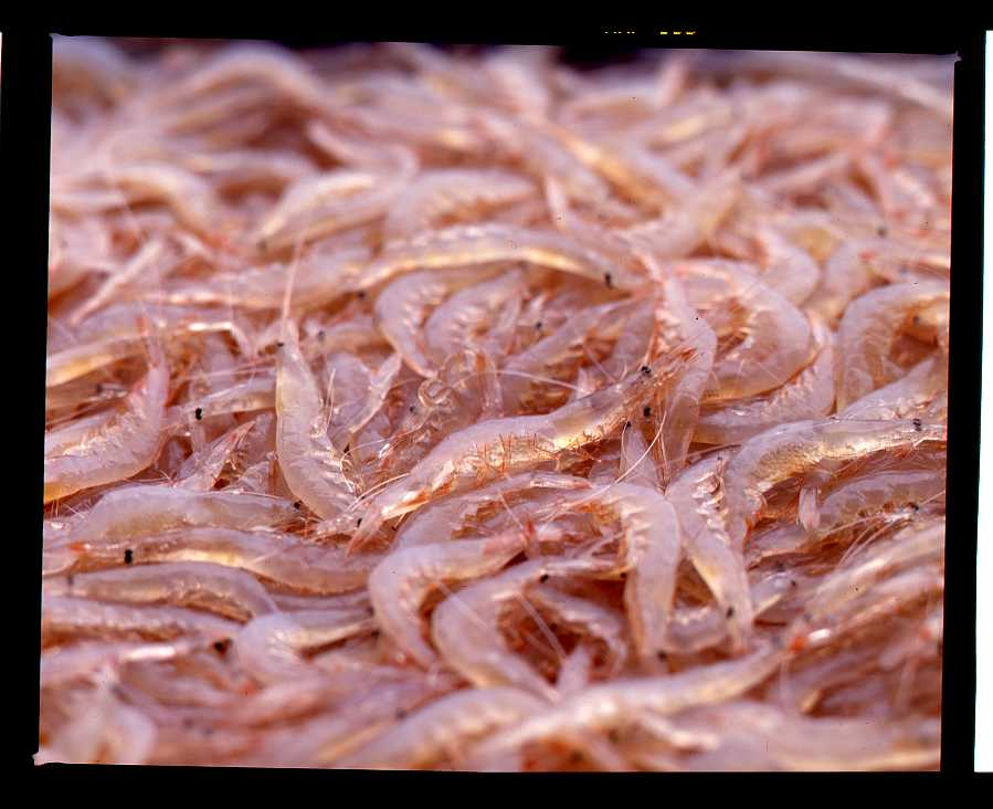 白えび 撮影：投稿者(kenji)